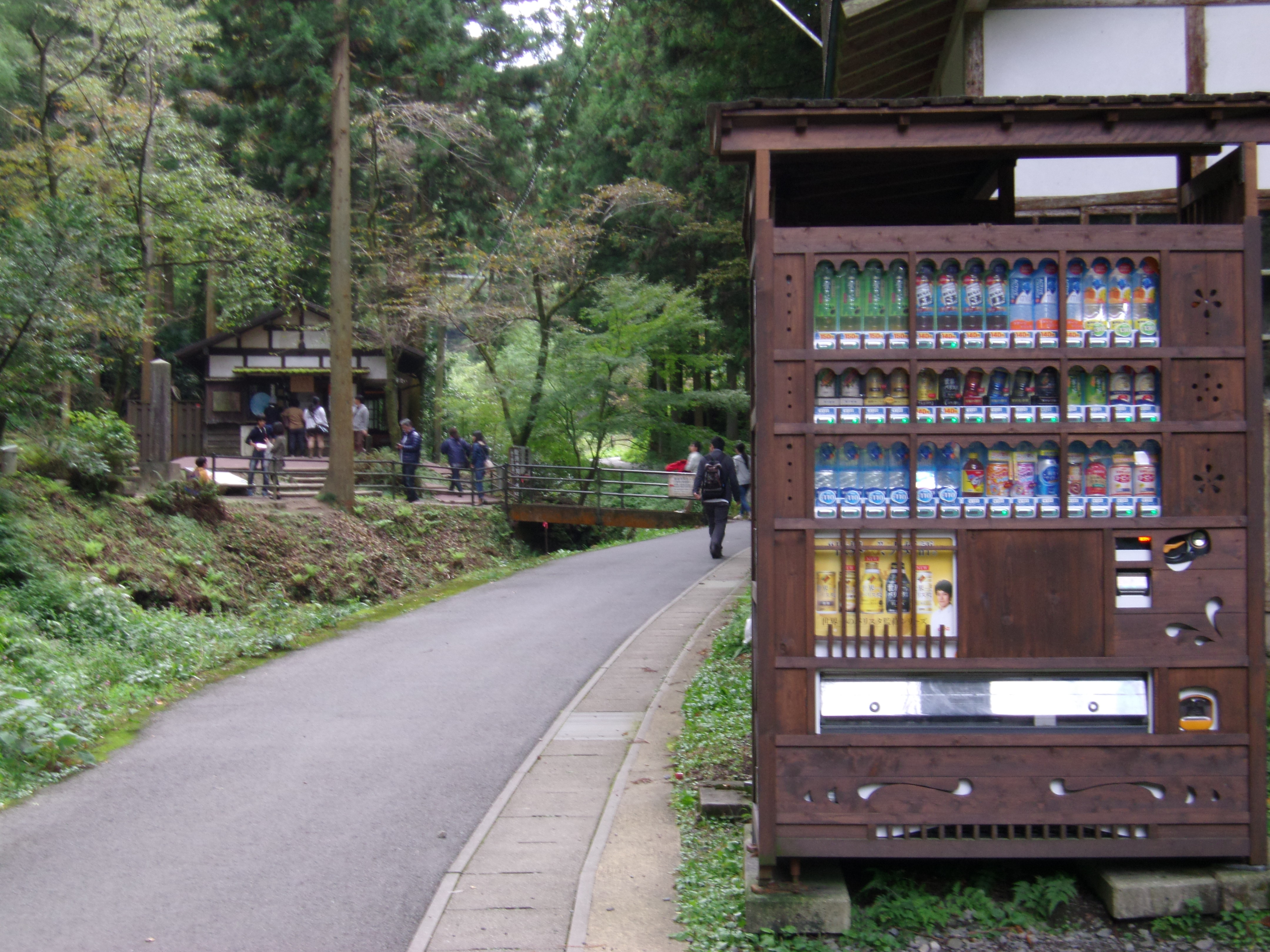 石見銀山でみられる景観に配慮し木目調の外装を施した自販機（ダイドー）